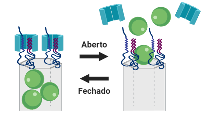 Esquema ilustrando uma nanoválvula em sistema aberto e sistema fechado. No sistema fechado, as moléculas permanecem confinadas dentro dos poros. No sistema aberto, ocorre a liberação das mesmas para o meio externo.